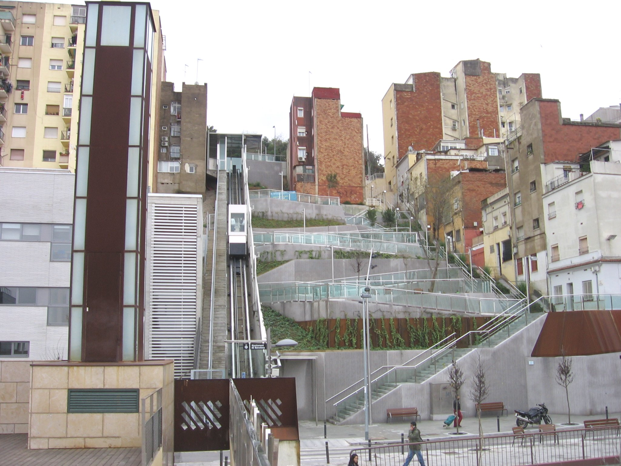 Ascensor inclinado en la calle Alguer, barrio del Carmelo, distrito de Horta-Guinardó (Barcelona).